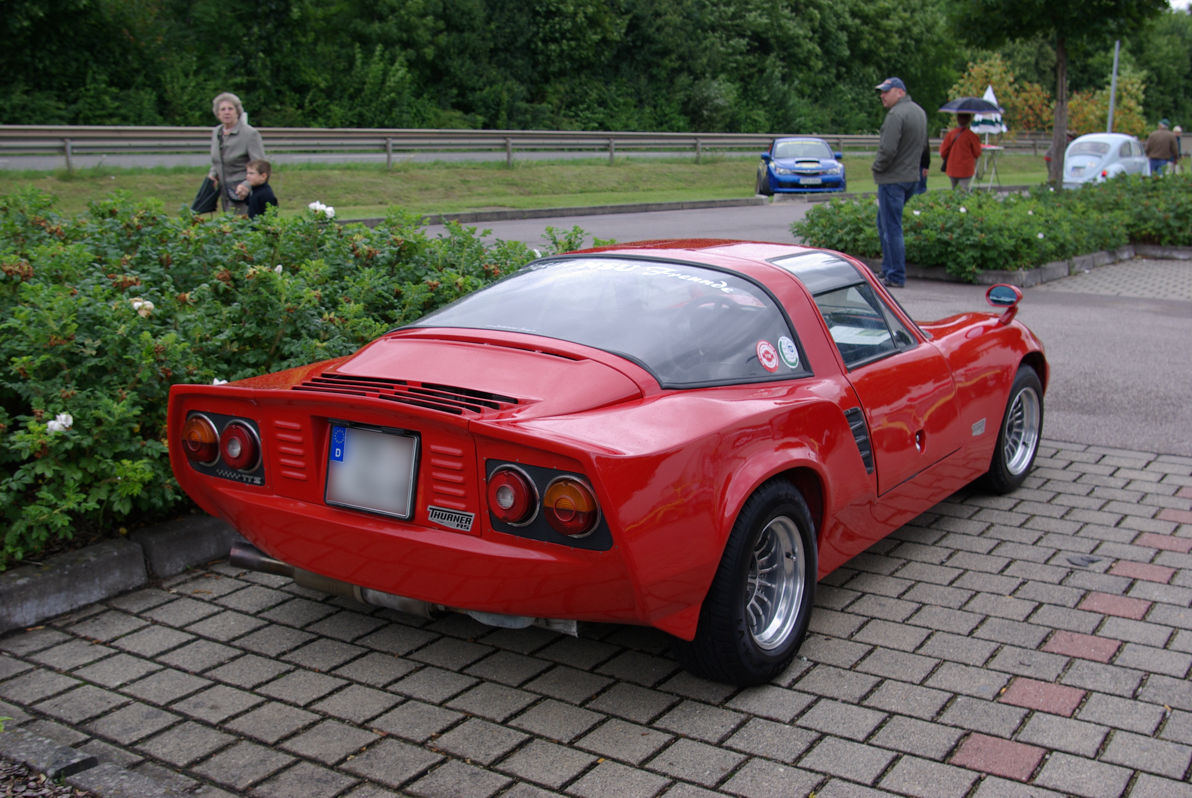 Thurner RS, Baujahr 1974, 75 PS aufgenommen bei / photographed at "25. Internationales Konzer Oldtimer-Treffen", 19. Juli 2009